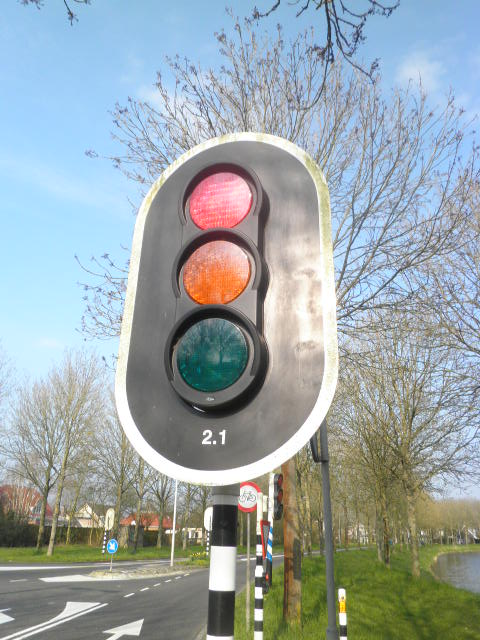 Stoplicht op de IJsselweg in Hoorn.